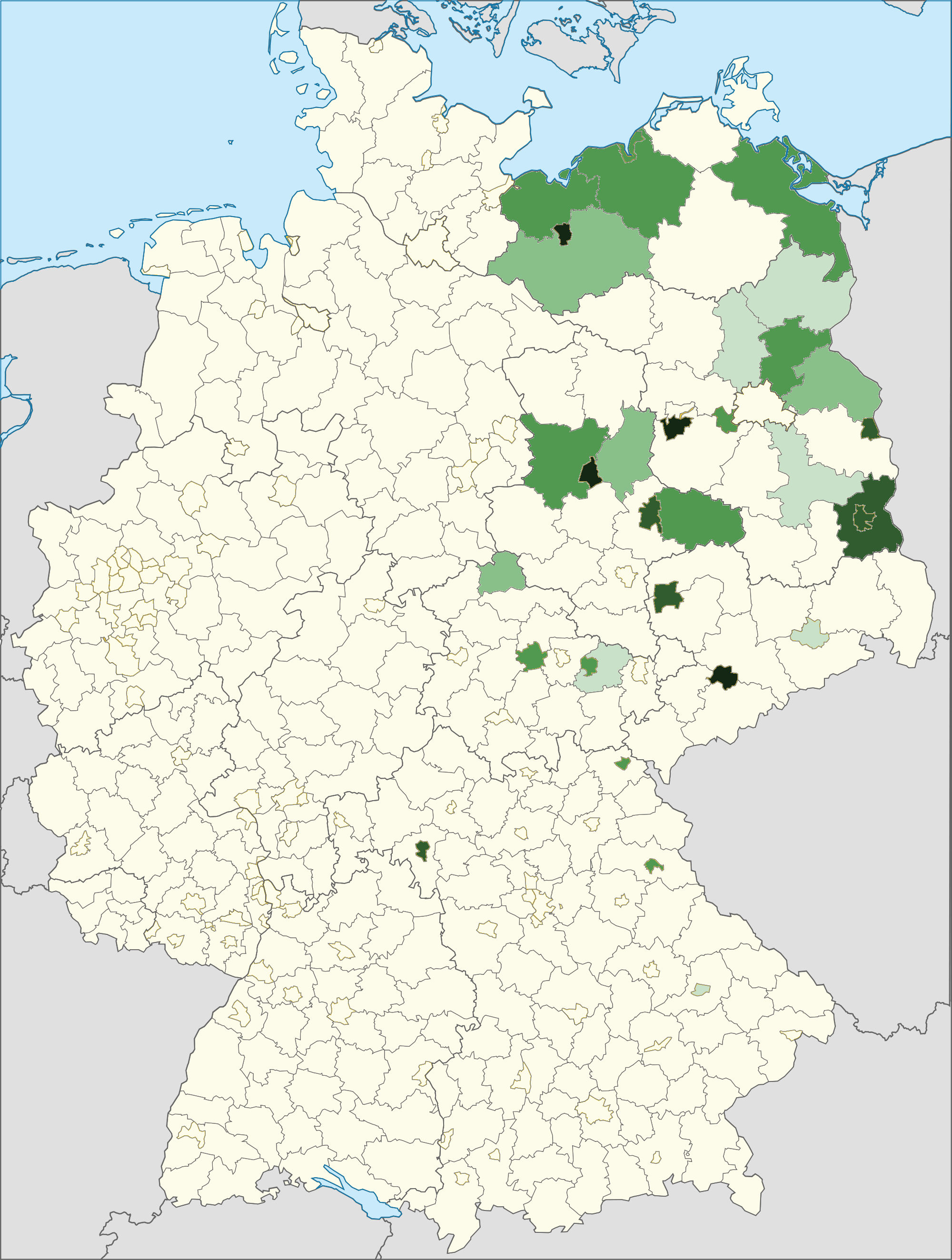 Karte der Personen mit ukrainischer Staatsangehörigkeit und deren relativer Häufigkeit in den Landkreisen 2014. Dunkelgrün: häufigste ausländische Staatsangehörigkeit in diesem Kreis, hellgrün: fünfthäufigste ausländische Staatsangehörigkeit in diesem Kreis, weiß: sechsthäufig oder weniger. Quelle: Ausländerzentralregister, Stand 31. Dezember 2014. Saarland: keine Daten auf Kreisebene (dargestellt ist die Landesebene). Deutschlandweite relative Häufigkeit der ausländischen Staatsangehörigkeit Ukraine: Platz 17.